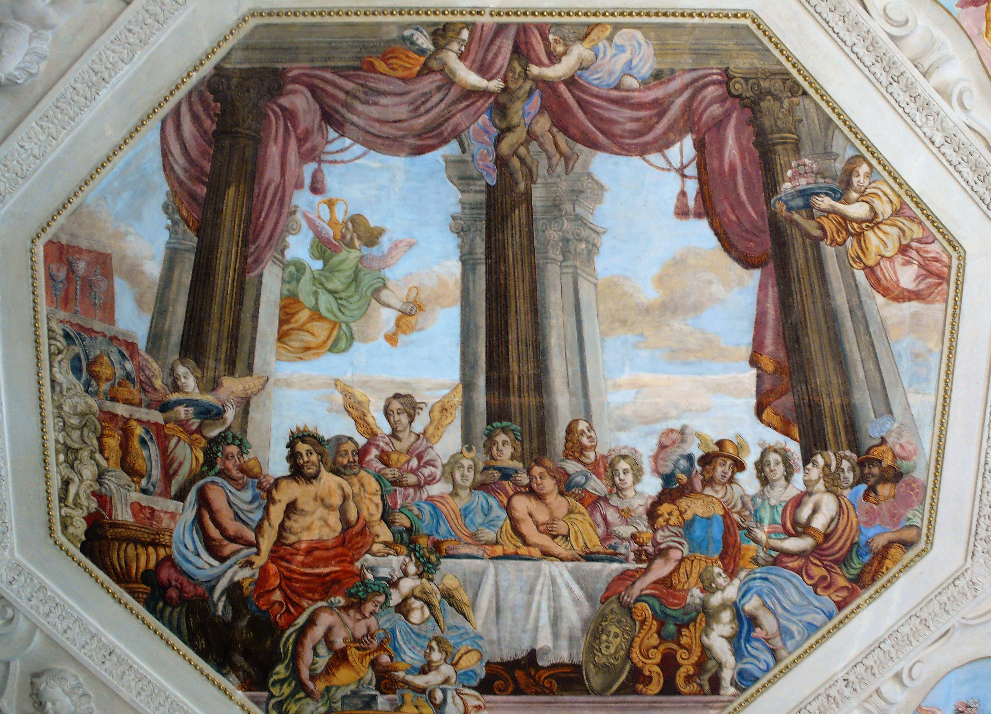 Nástropní freska v balkonovém sále (původně jídelně) Lobkowiczského paláce (Pražský hrad).